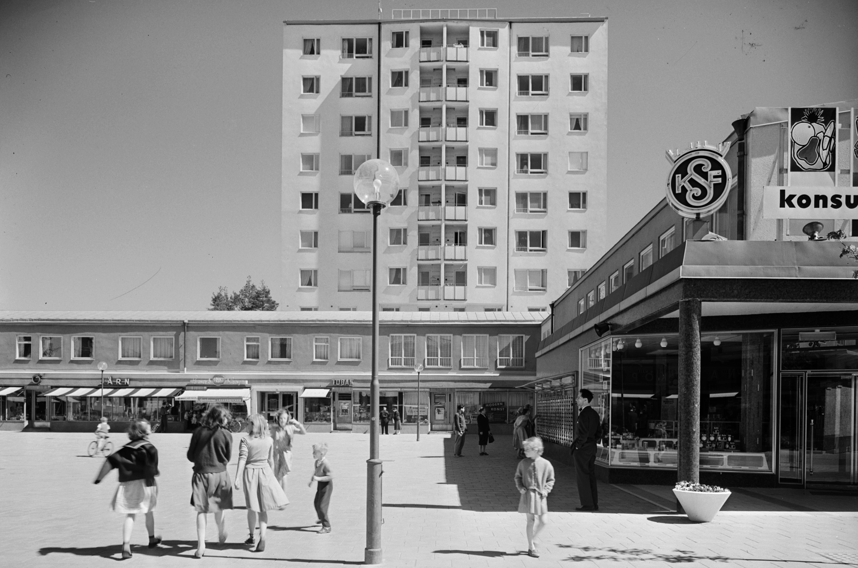 Bagarmossens centrum. Lagaplan med tidstypisk centrumbebyggelse ritad av arkitekt Nils Sterner